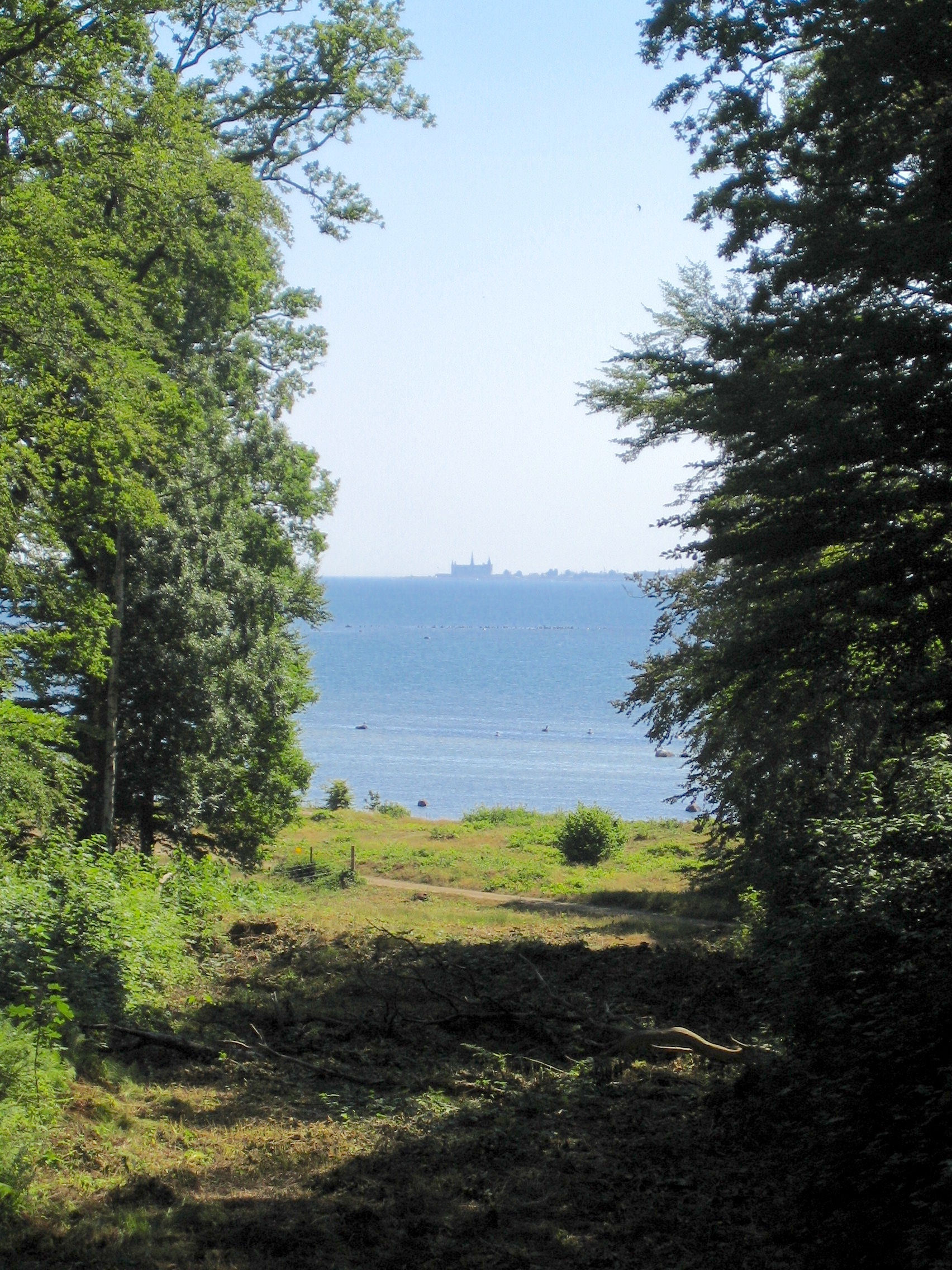 Kulla Gunnarstorps naturreservat, utsikt mot Kronborg